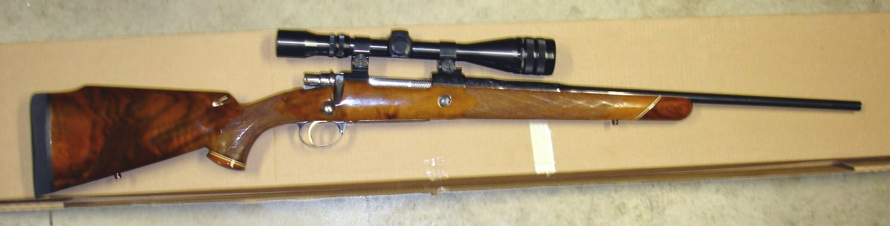 Browning Hi Power "Medallion" Grade Rifle in .270 Winchester Caliber made in Belgium